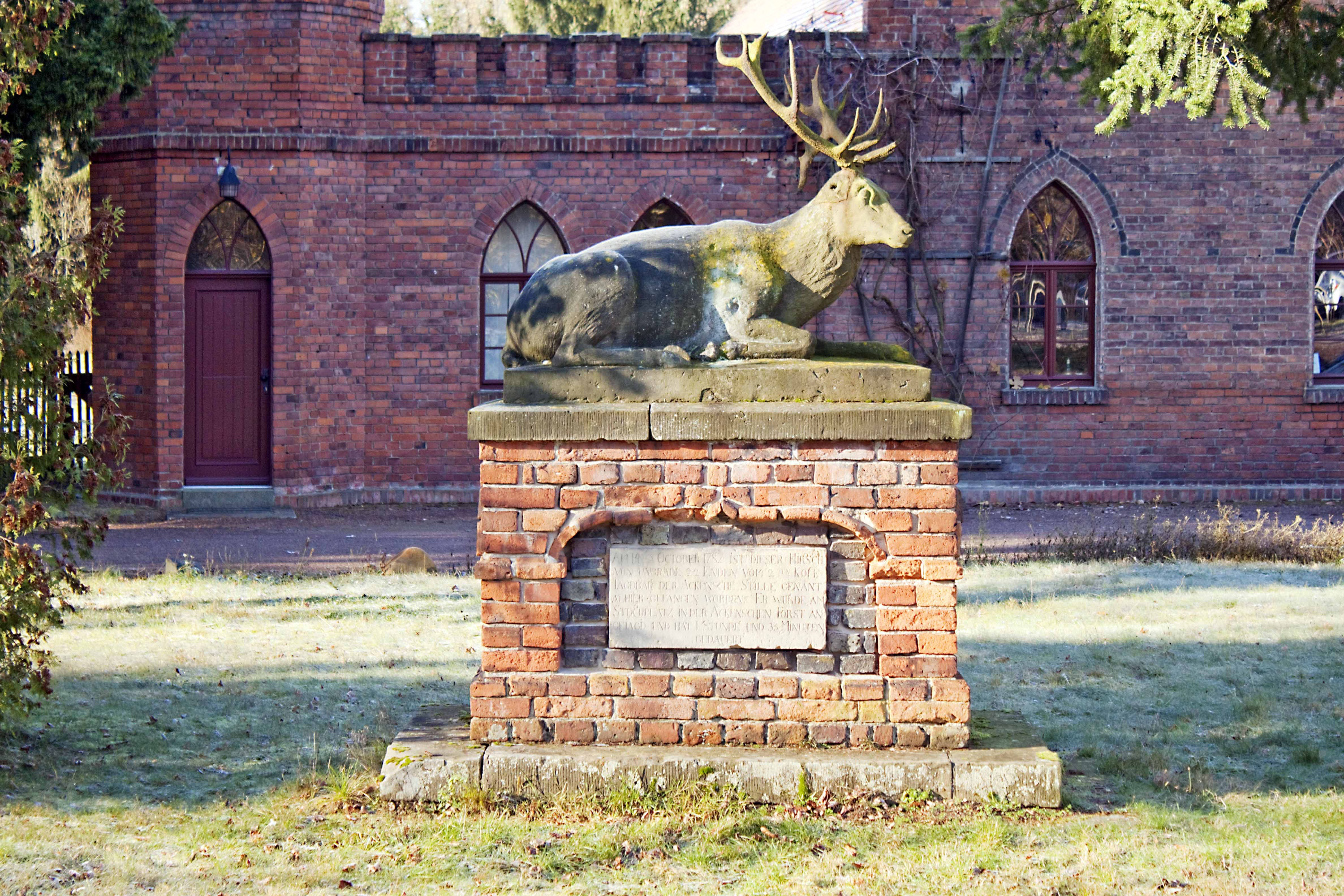 Denkmal vor dem Jagdschloss Haideburg